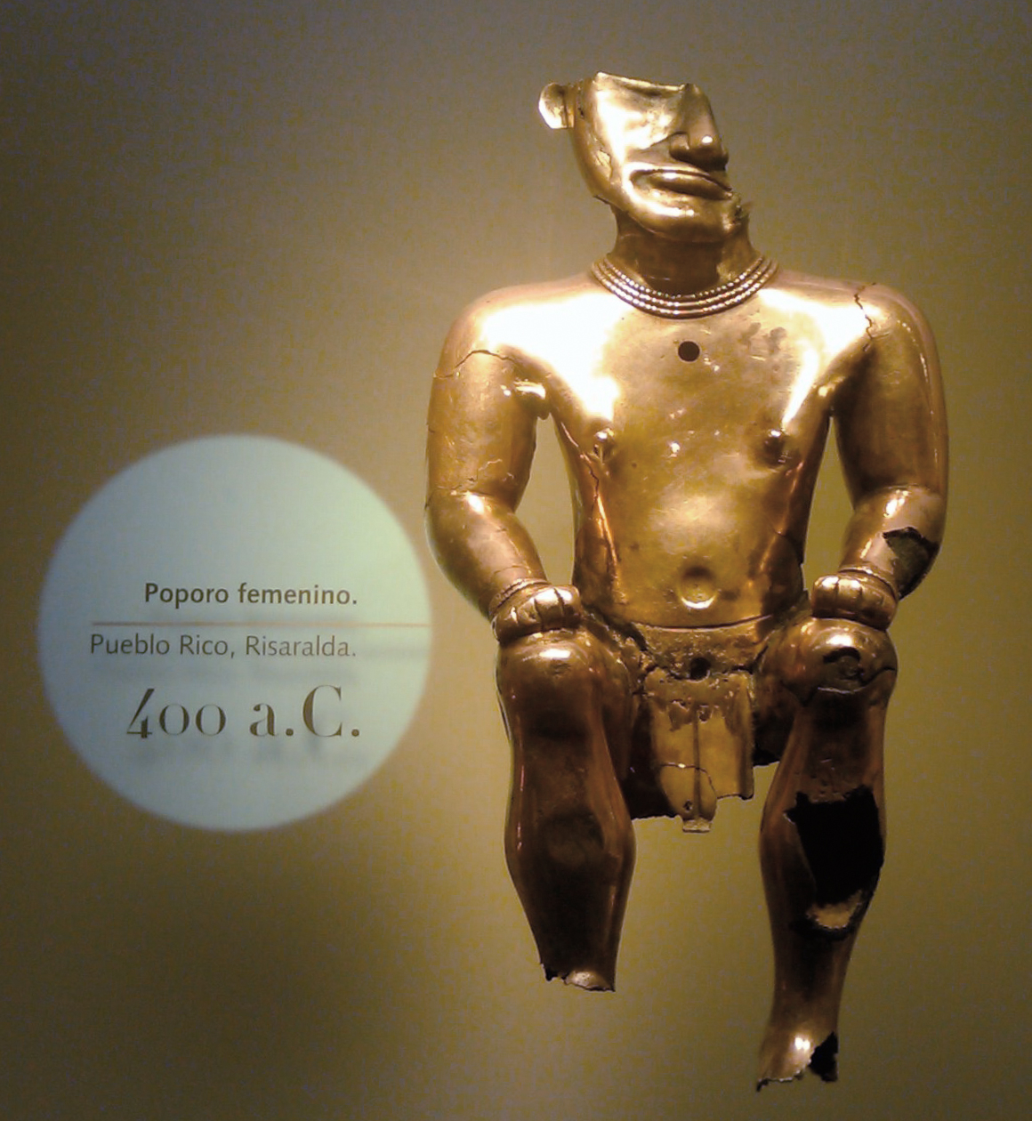 Poporo (lime container) - seated female Tumbaga 0 - A.D. 600 Pueblorrico, Risaralda Quimbaya 24 x 11,8 x 7,2 cm Reference: Museo del Oro, Bogotá